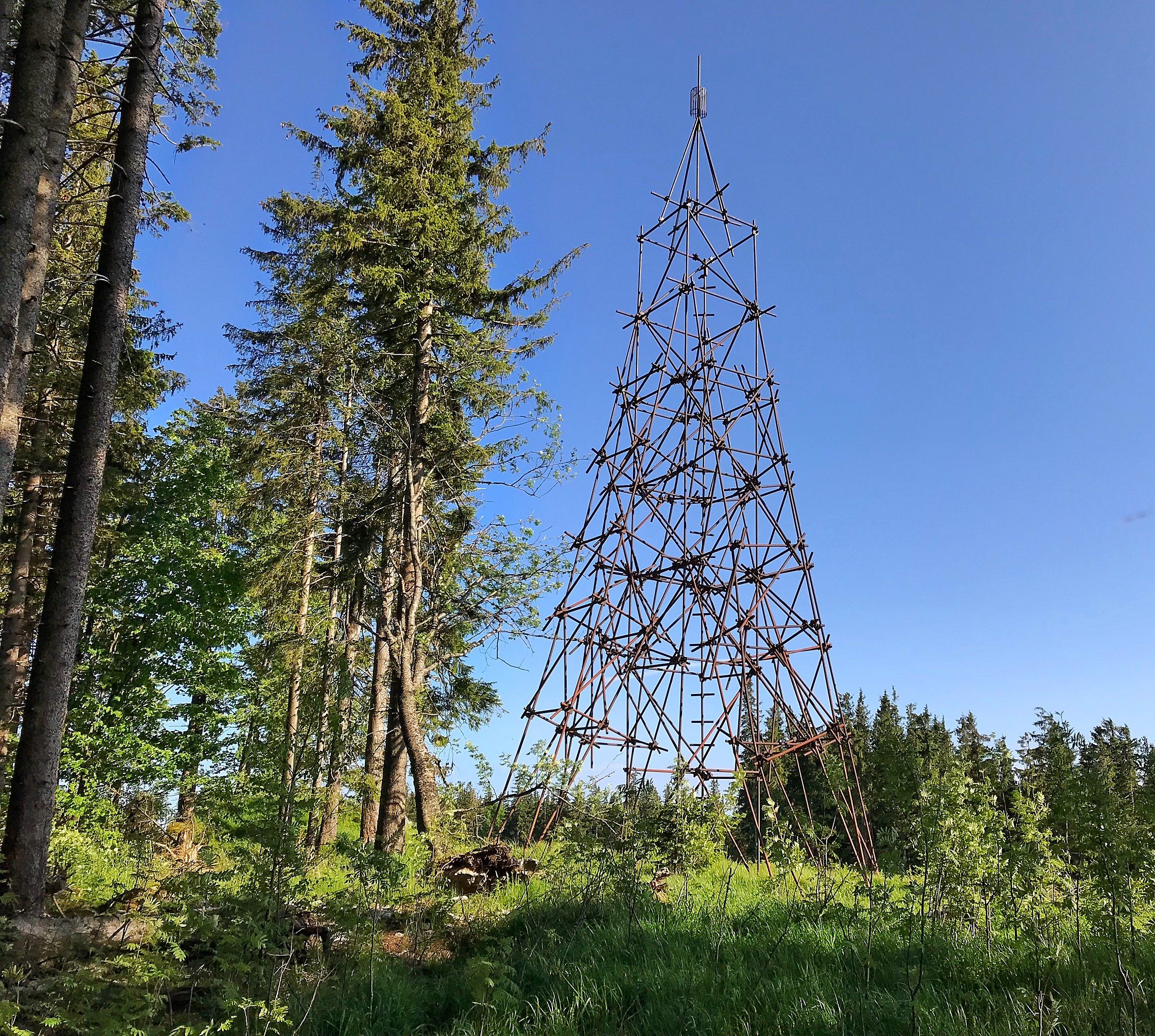 Vojenská rozhledna na vrcholu šumavského Špičáku (1221 m)